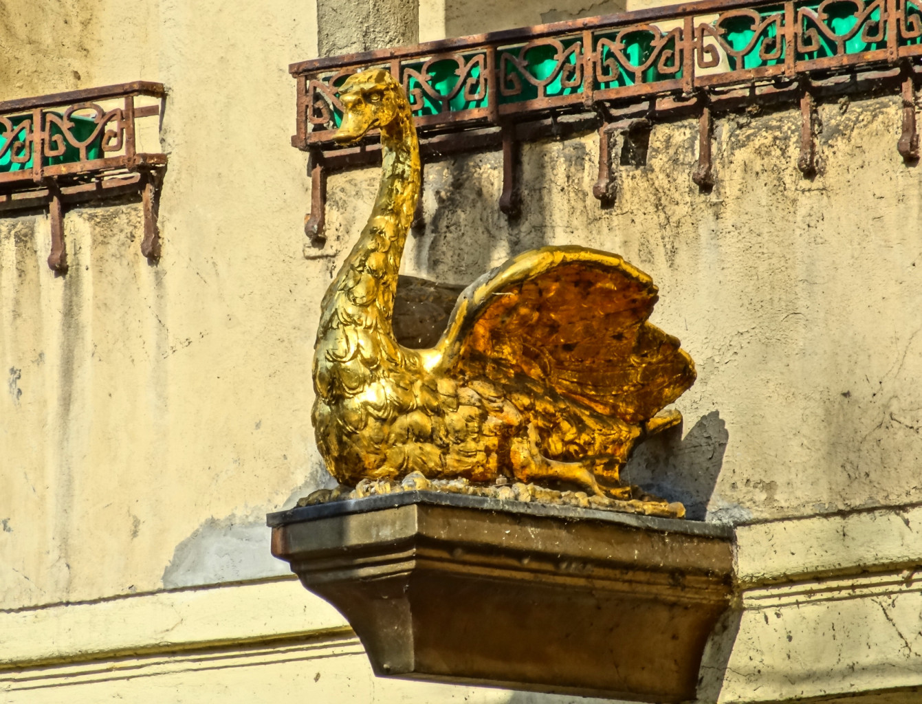 Kamienica przy ul. Gdańskiej 5 w Bydgoszczy. Rzeźba łabędzia